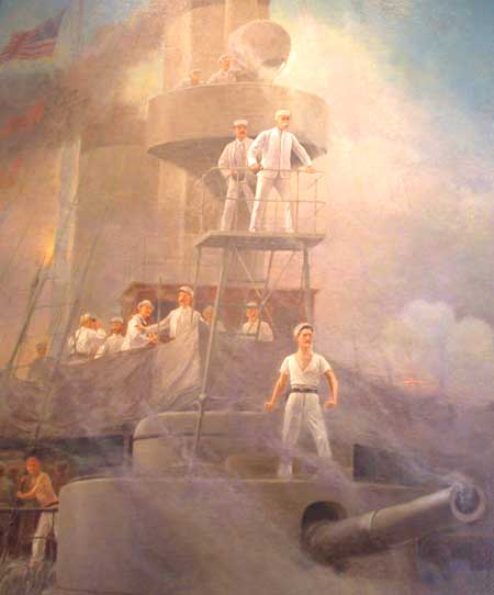 Battle of Manila Bay, 1 May 1898